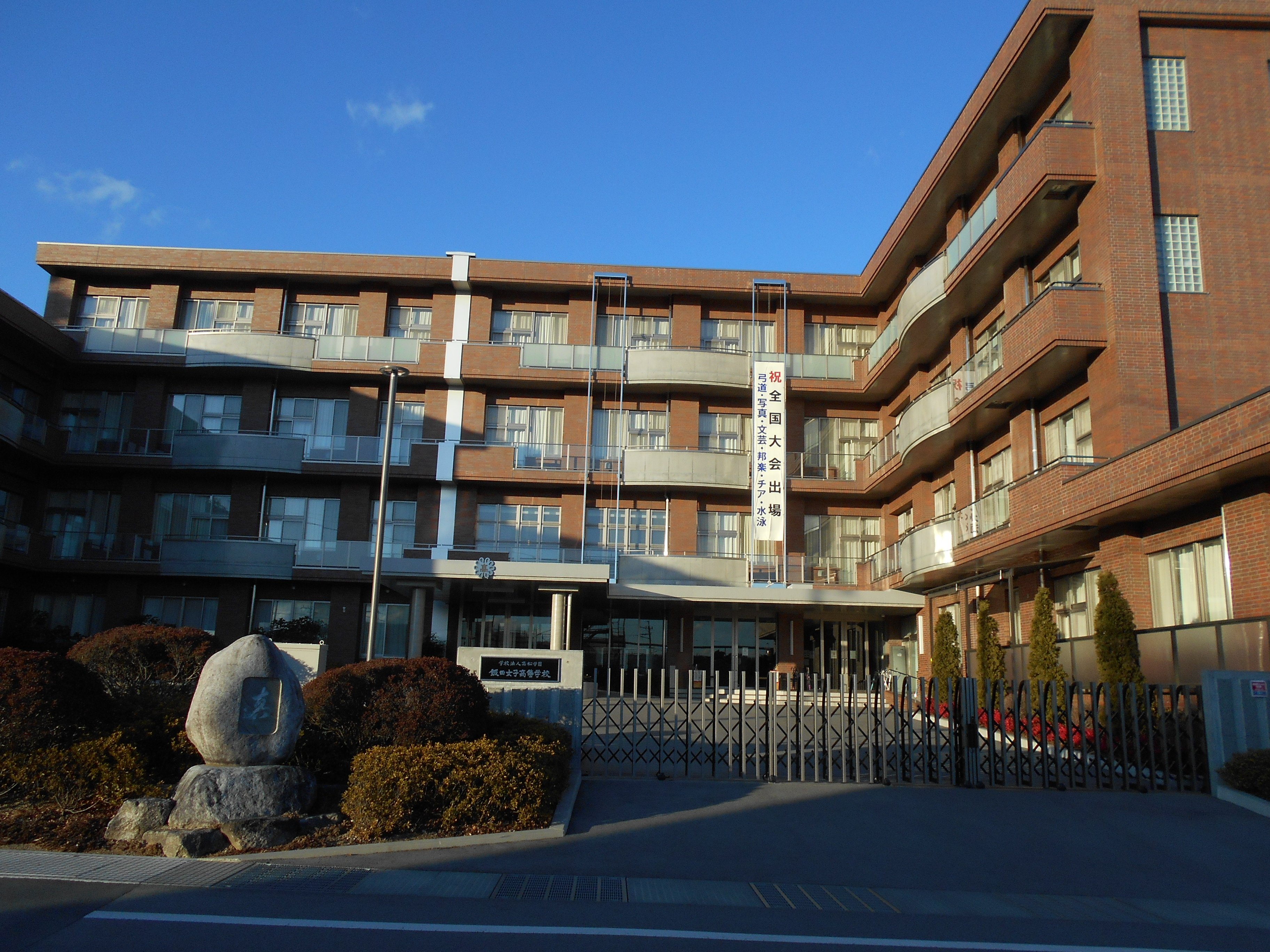 学校法人高松学園 飯田女子高等学校